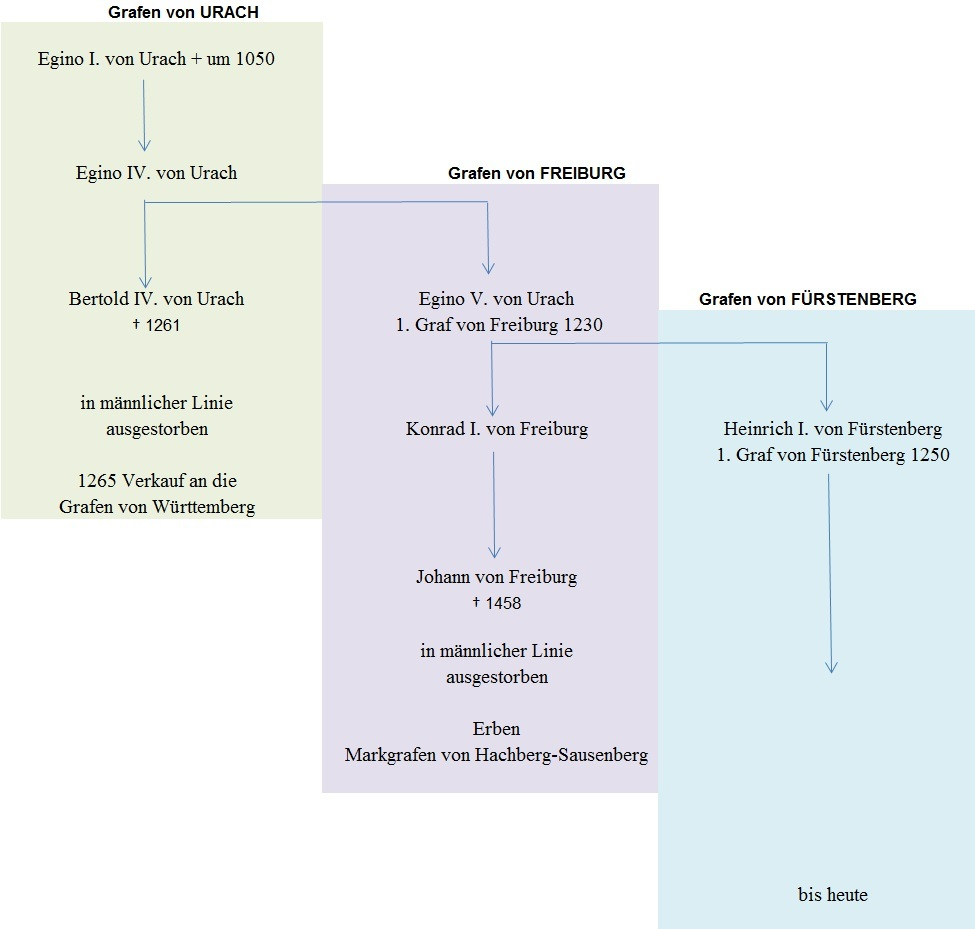 Übersicht über den Zusammenhang der Grafen von Urach, Freiburg und Fürstenberg